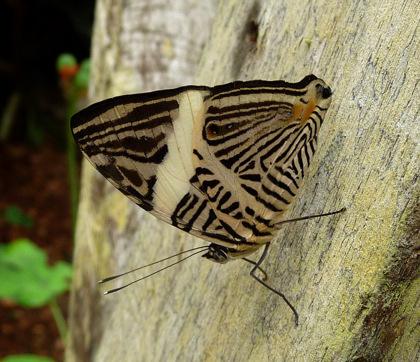 Colobura dirce .Zebra Mosaic. Tribe Coeini.